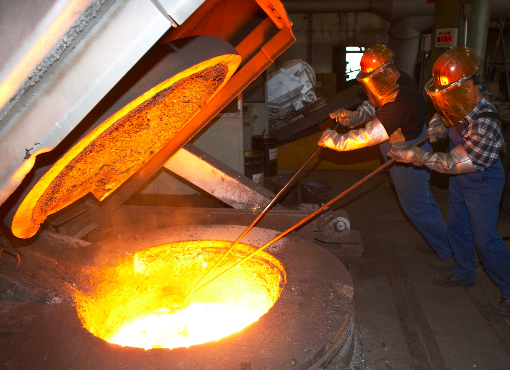 Arbeiter am Schmelzofen